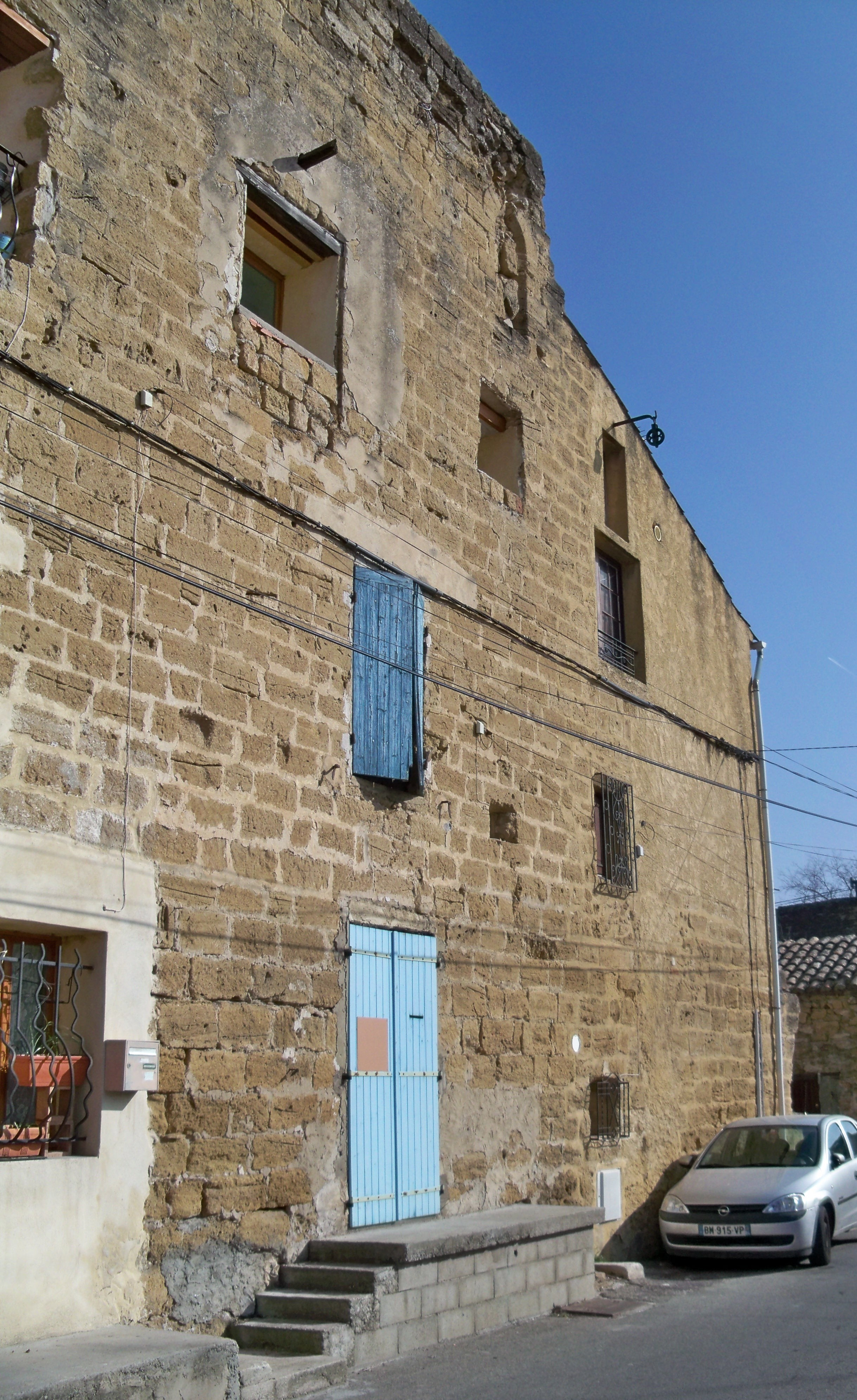 Palais des Papes de Sorgues - batiement réaménagé